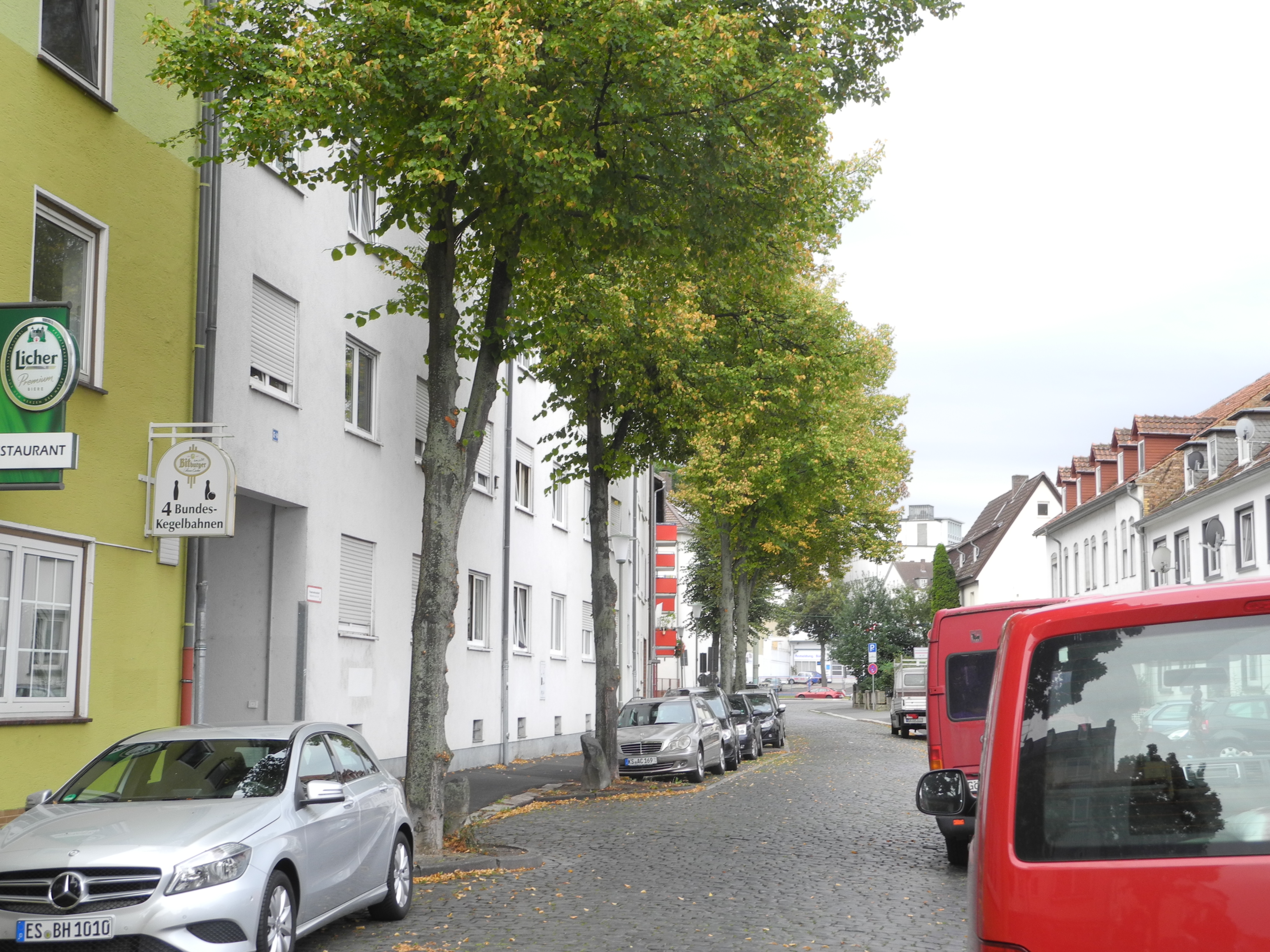 7000 Eichen – Stadtverwaldung statt Stadtverwaltung, eine Soziale Plastik von Joseph Beuys, gestartet 1982 auf der documenta 7 in Kassel, Hessen, Deutschland. Standort: Rothenditmolder Straße, südlich der Schillerstraße Art: Kaiserlinde (Tilia x vulgaris 'Pallida' ) Pflanzjahr: 1987